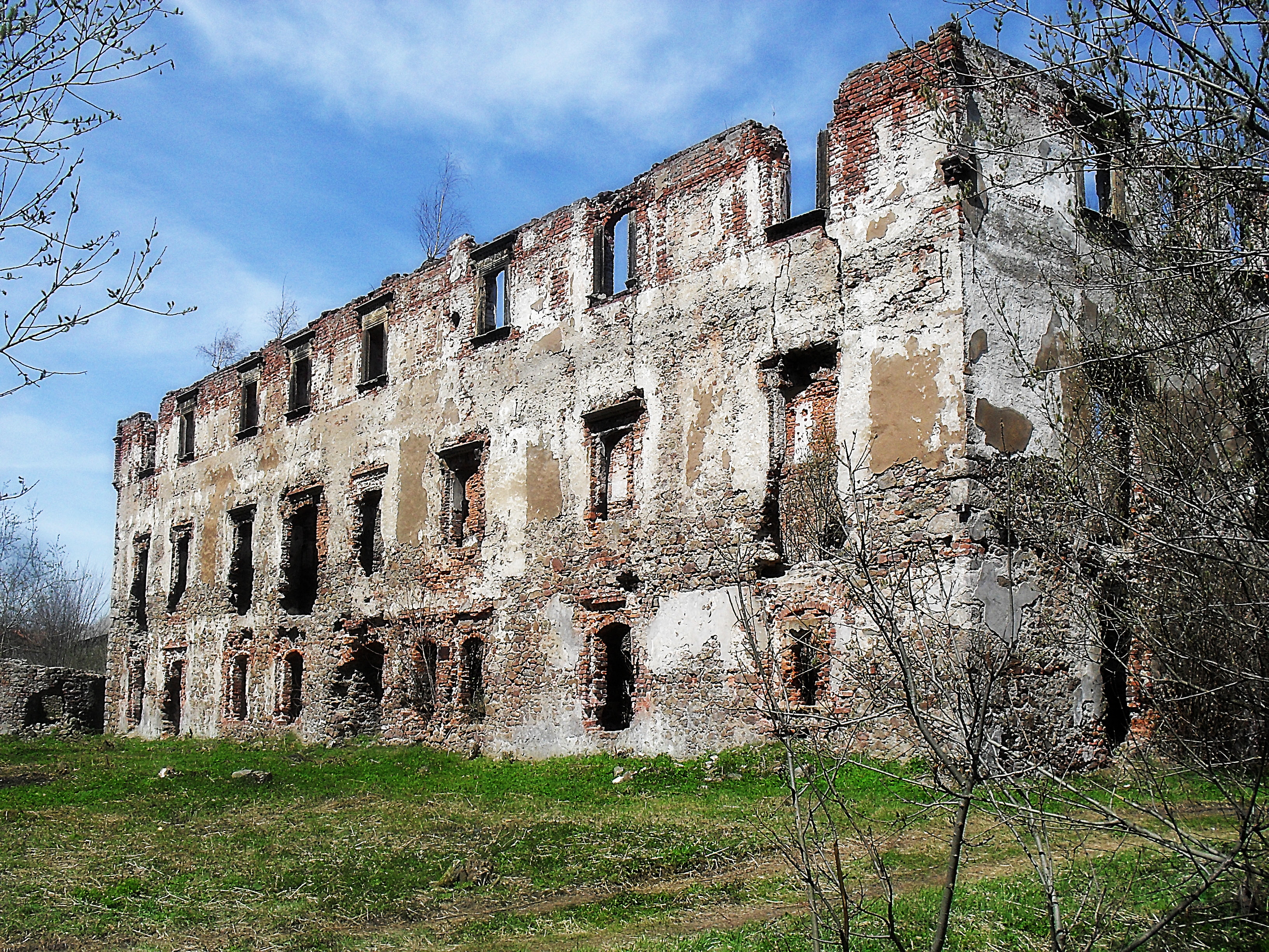 Kamienna Góra, ruiny zamku